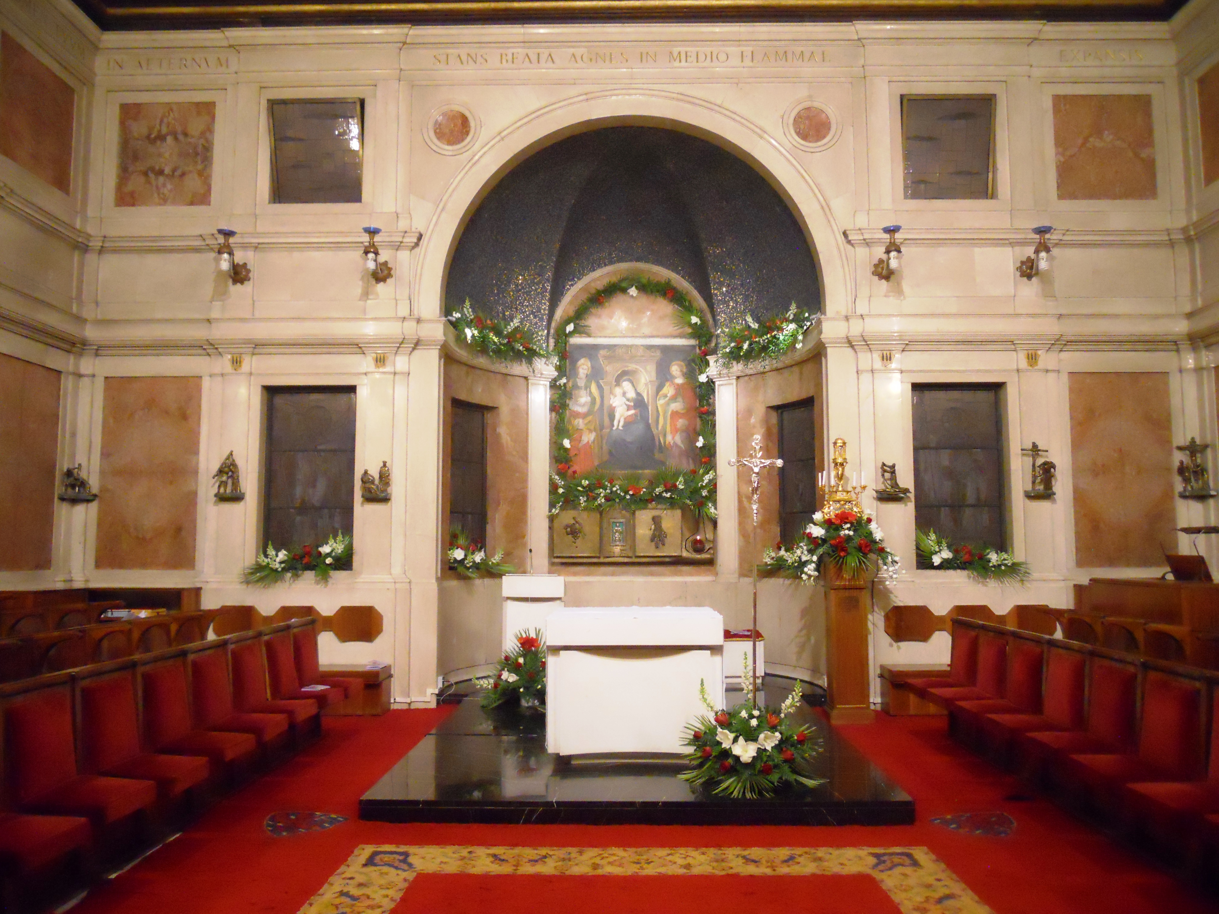 La cappella di Sant'Agnese all'interno dell'Almo Collegio Capranica